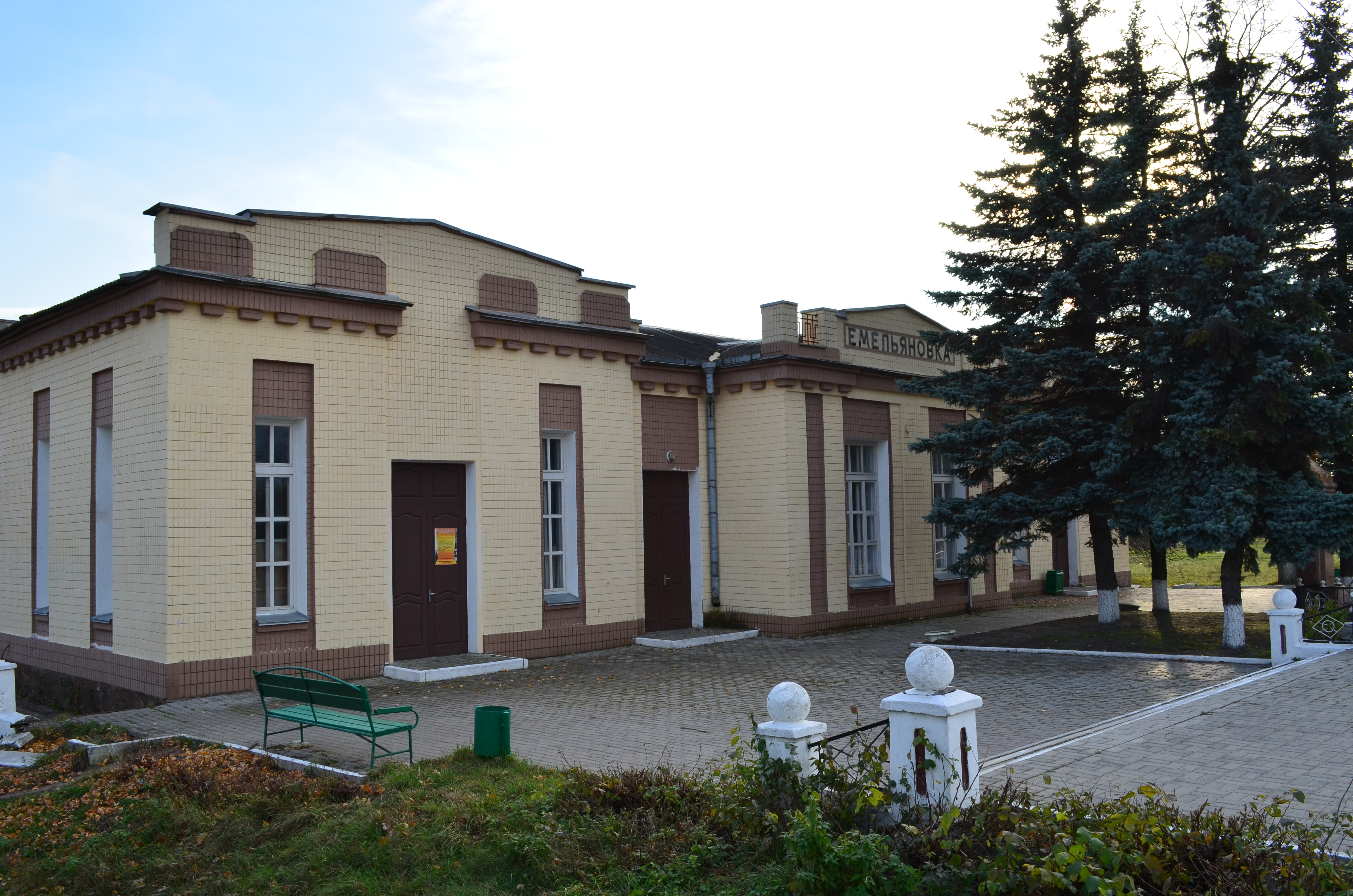 ст. Омельянівка